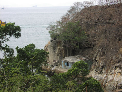 中文（香港）: 瀑布灣公園